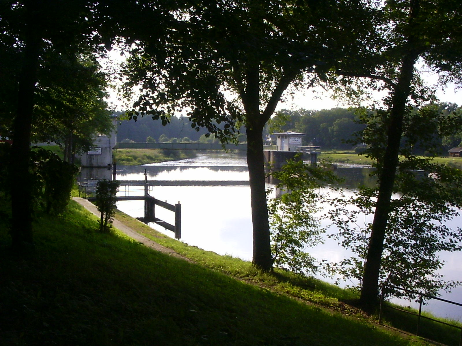 Hanekenfähr, dam in de Eems